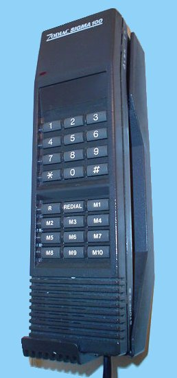 Integra butonara mura plasta telefono